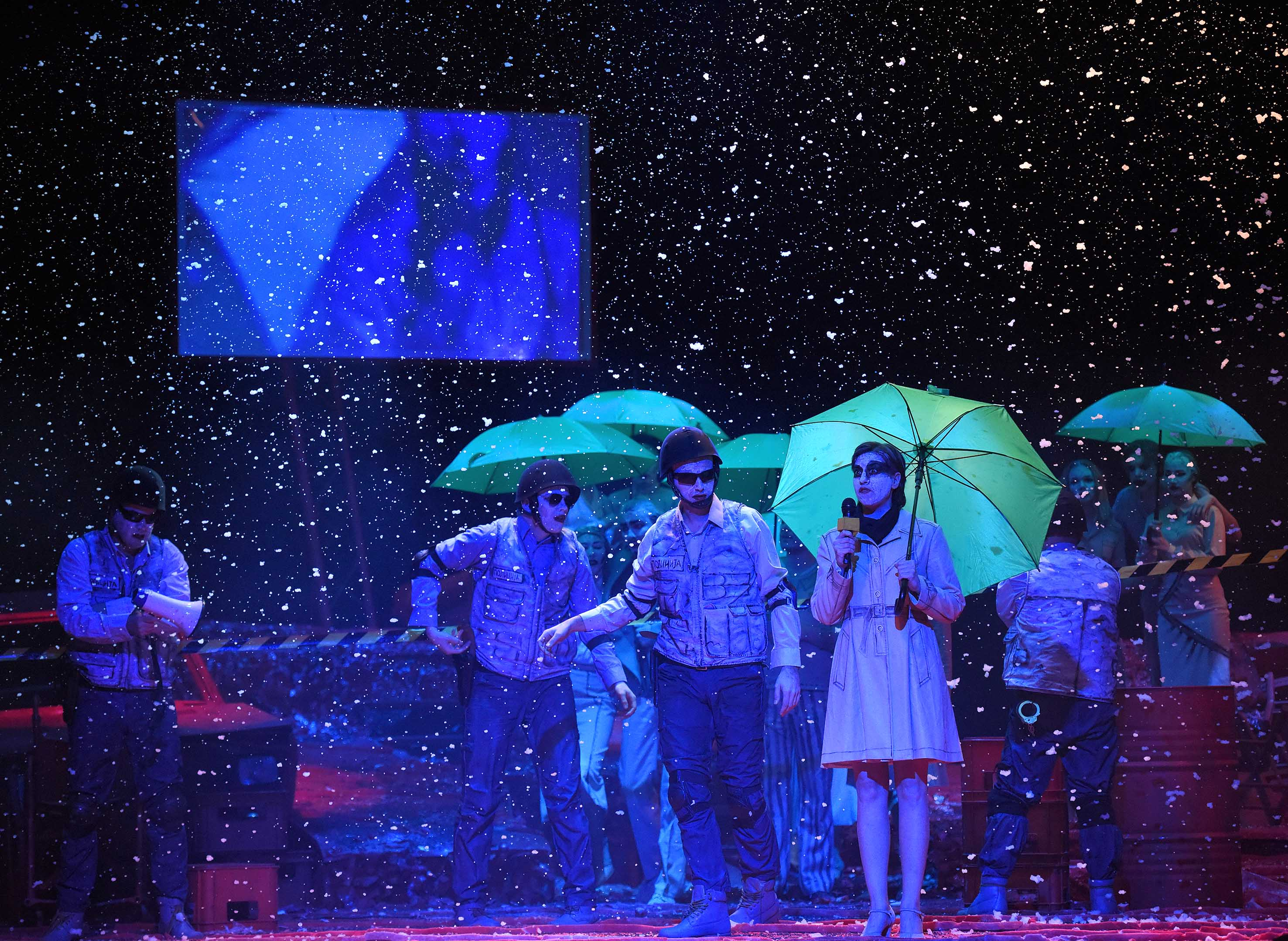 Fotografija iz predstave Dvesta